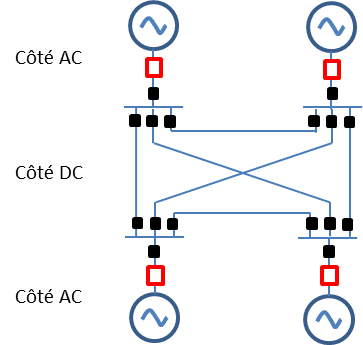 Réseau HVDC maillé incluant des disjoncteurs HVDC. Les disjoncteurs HVDC sont en noir, les Postes de conversion HVDC en rouge.